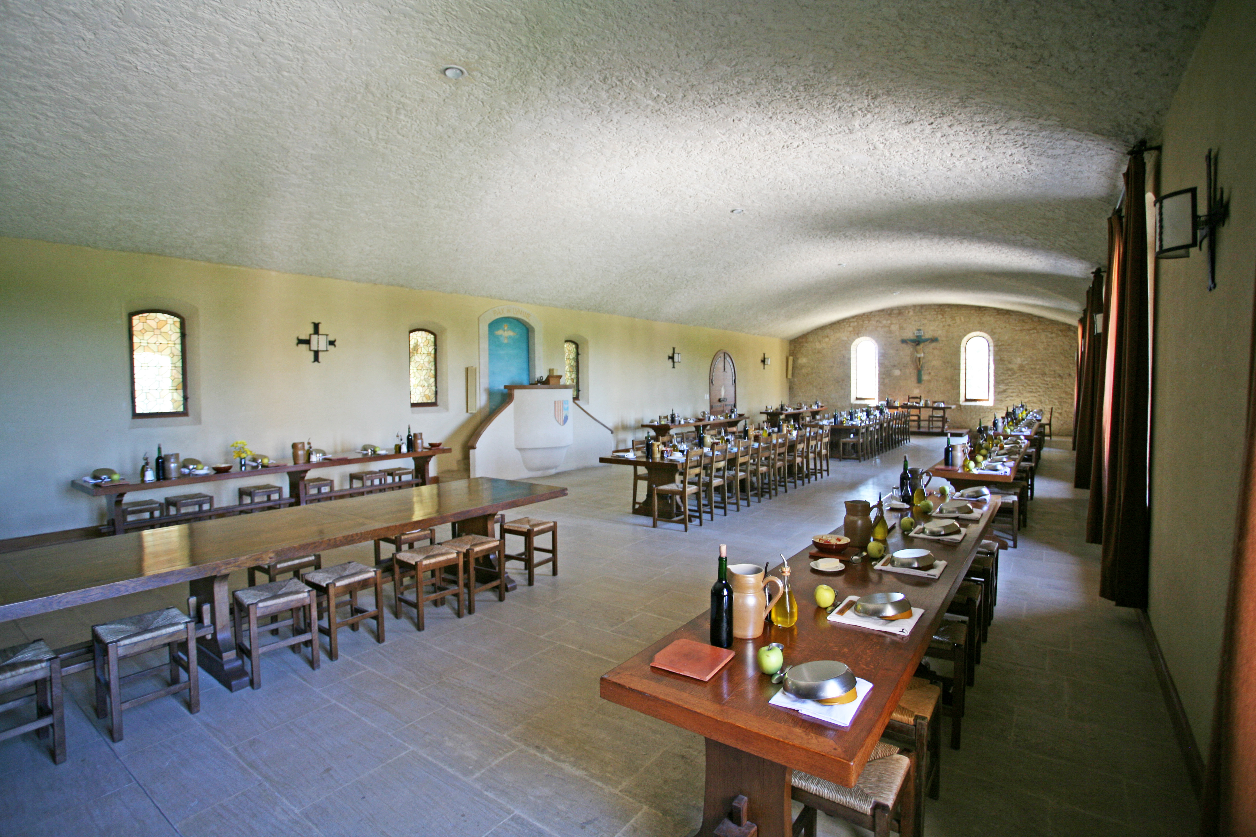 Le refectoire de l'Abbaye Sainte-Madeleine du Barroux, Vaucluse, France.